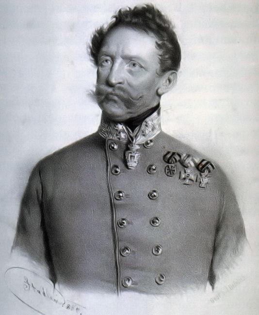 Ottinger Ferenc (1792–1869) ideiglenes magyar hadügyminiszter, császári és királyi lovassági tábornok